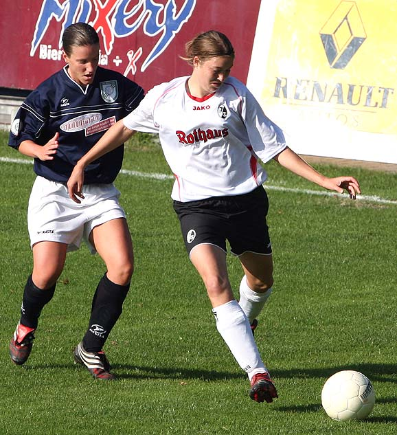 Ines Österle (rechts) beim Bundesligaspiel FFC Brauweiler Pulheim vs. SC Freiburg am 15.10.2006 (Endstand 0:2)